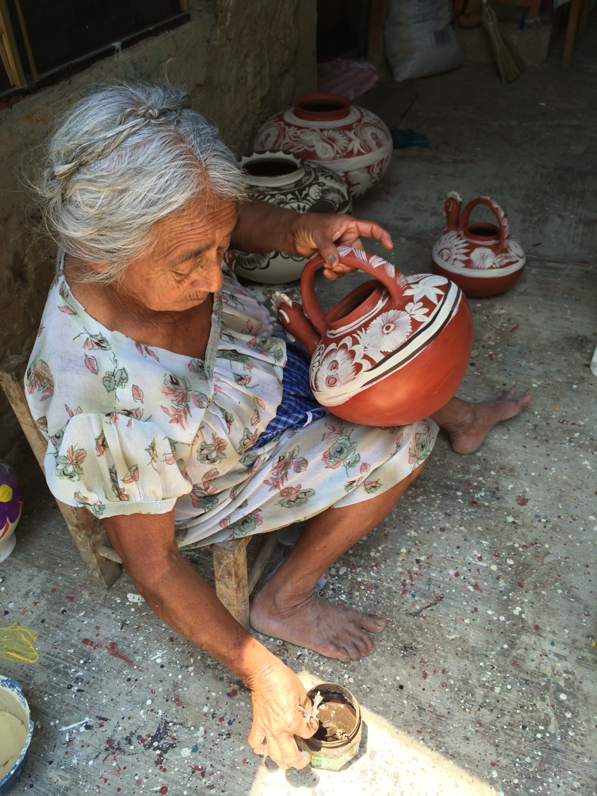 Maestra artesana decorando el barro en Chililico, Hidalgo